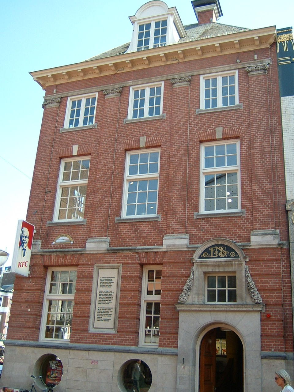 Eigen foto